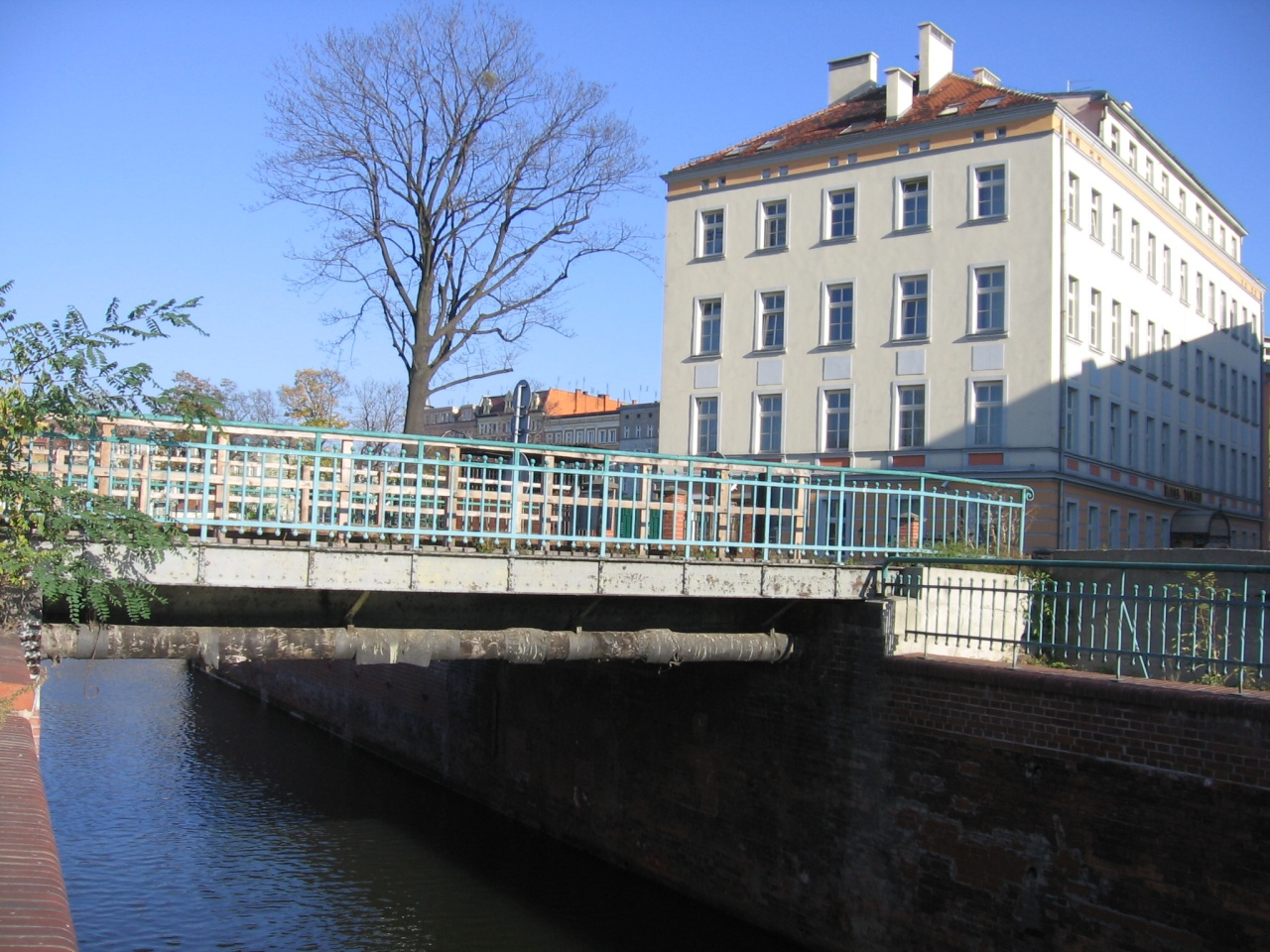 Wrocław, Poland Słodowy Bridge (Most Słodowy), view from Słodowa Island